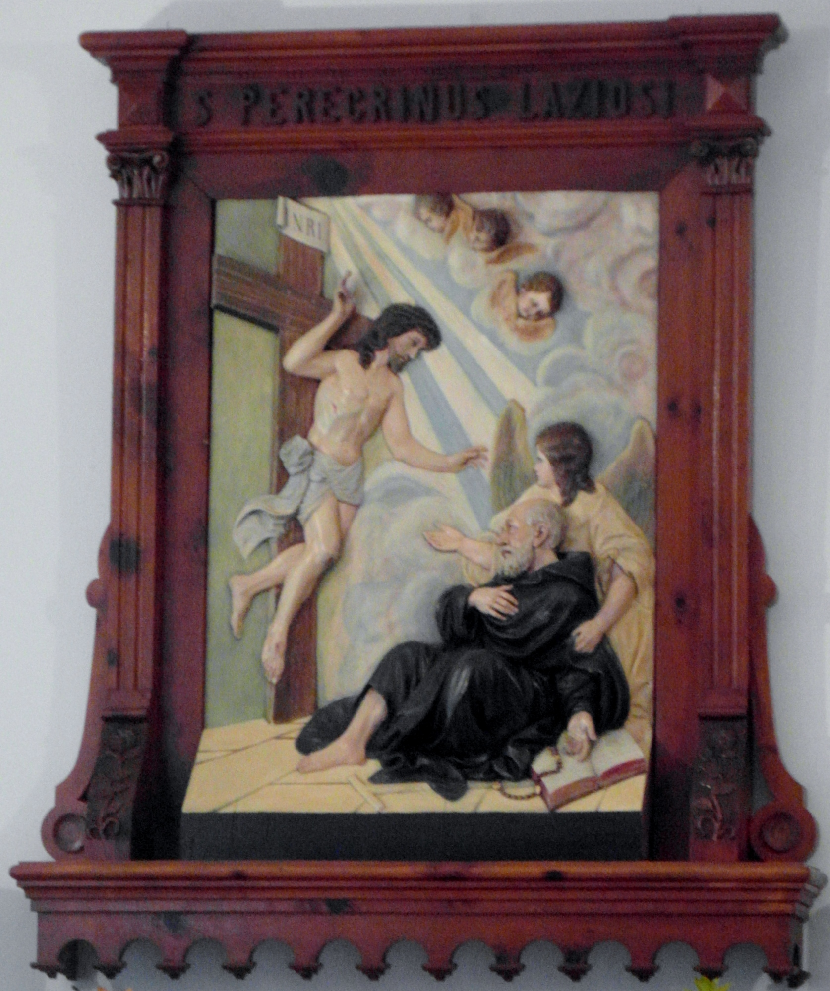 Pellegrino Laziosi presso il Santuario di Pietralba